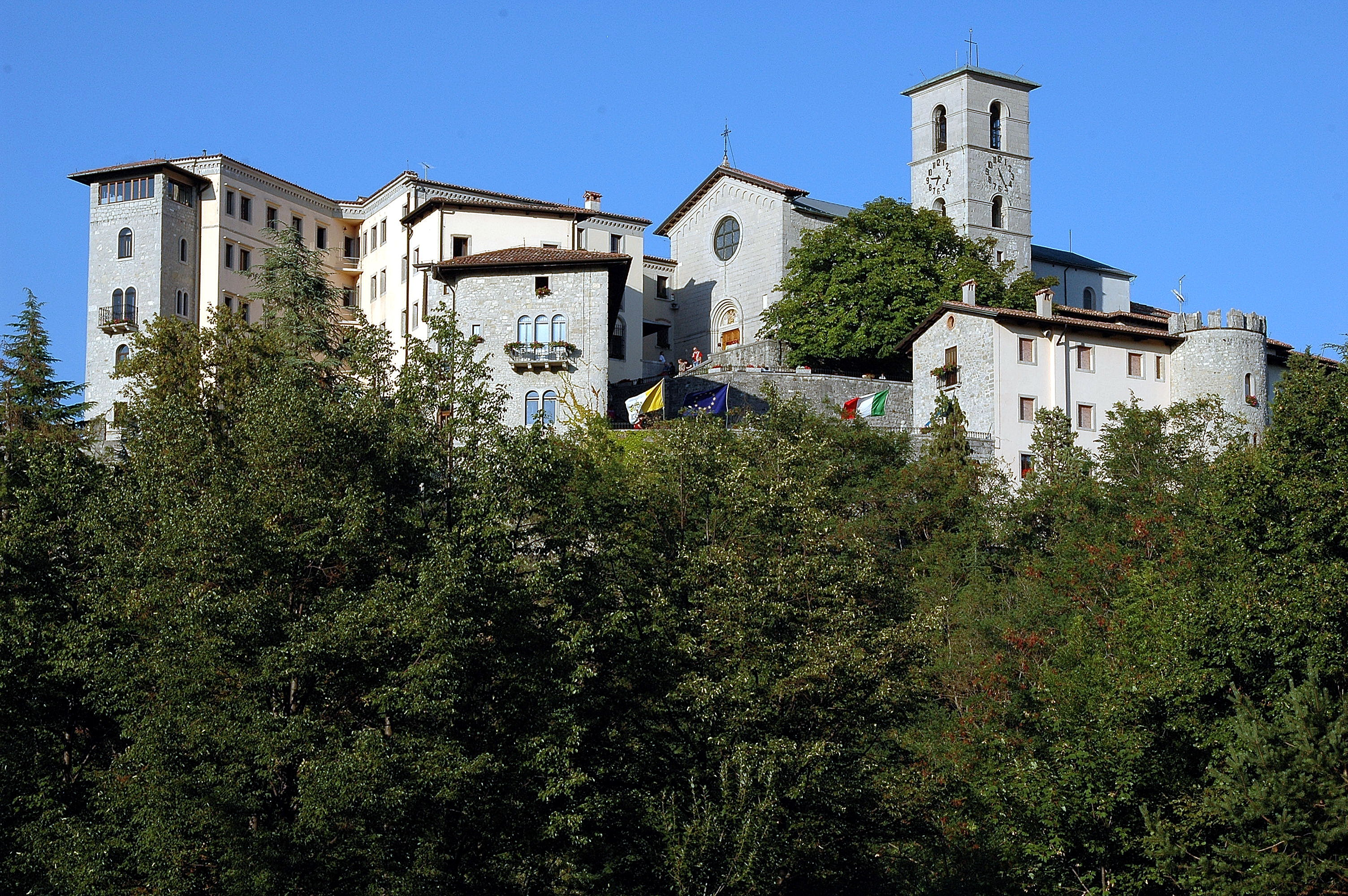 Castle and sanctuary Castelmonte, Prepotto, province of Udine, Friuli-Venezia Giulia, Italy